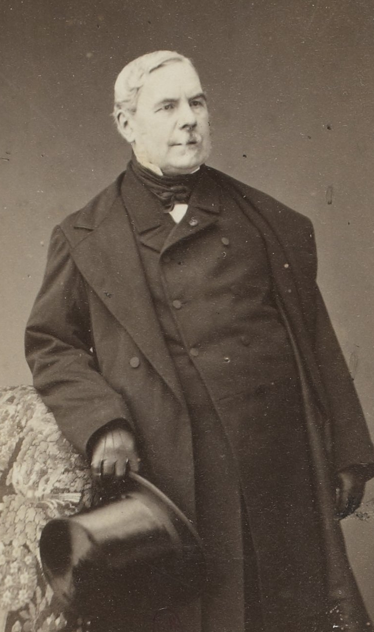 Personnalités françaises et étrangères sous le Second Empire.